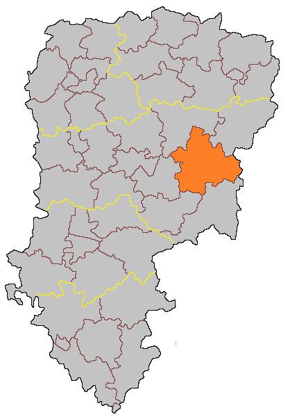 Кантон Сиссон на карте департамента Эна